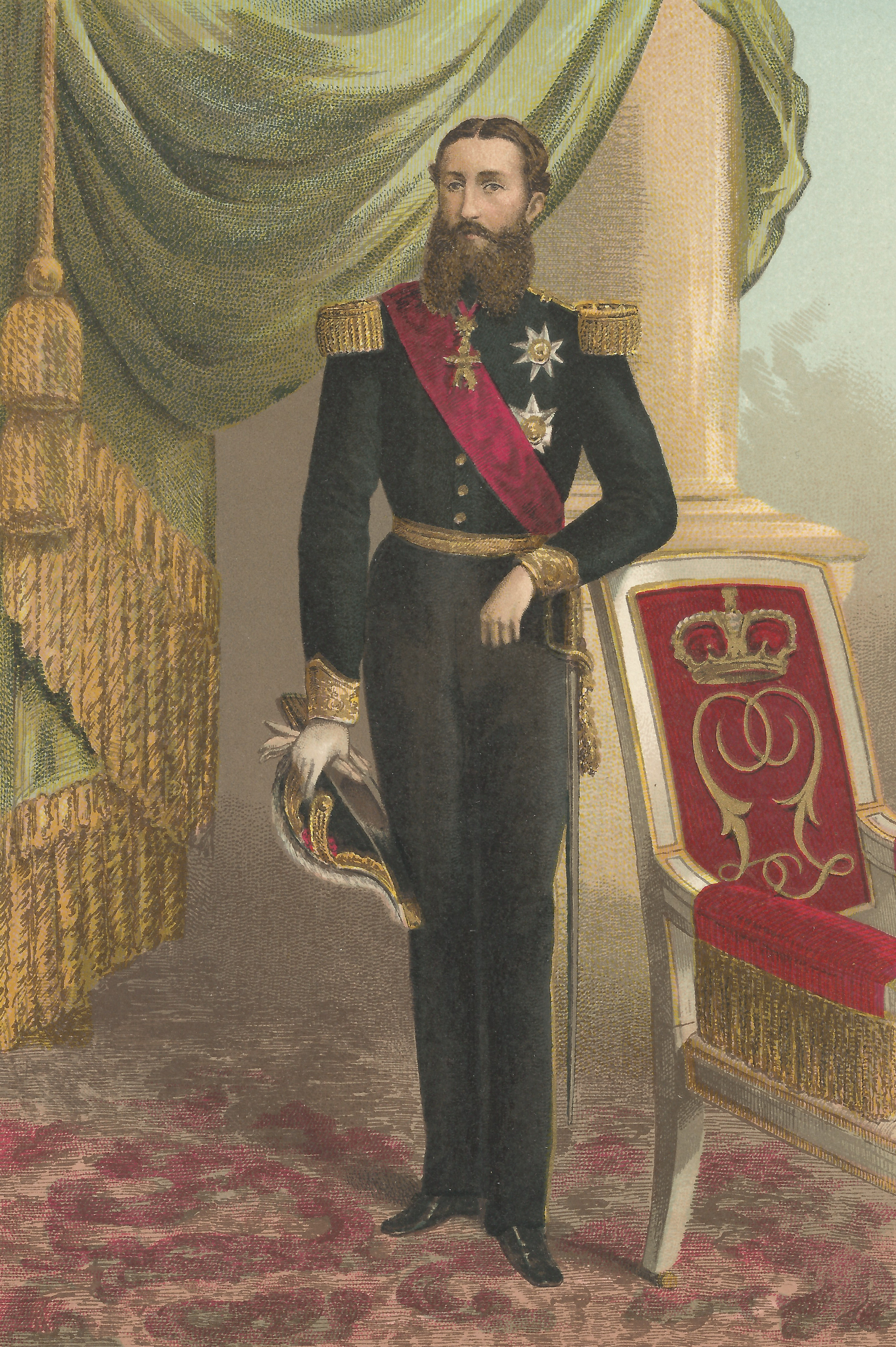 S.M. le roi Léopold II de Belgique. — Sur la chaise est brodé le monogramme (ou chiffre) du roi Léopold II, composé de deux L, le tout est surmonté d’une couronne royale. Chromolithographie (G. Severeyns, successeur : J.L. Goffart) hors-texte entre les pp. 324 et 325.